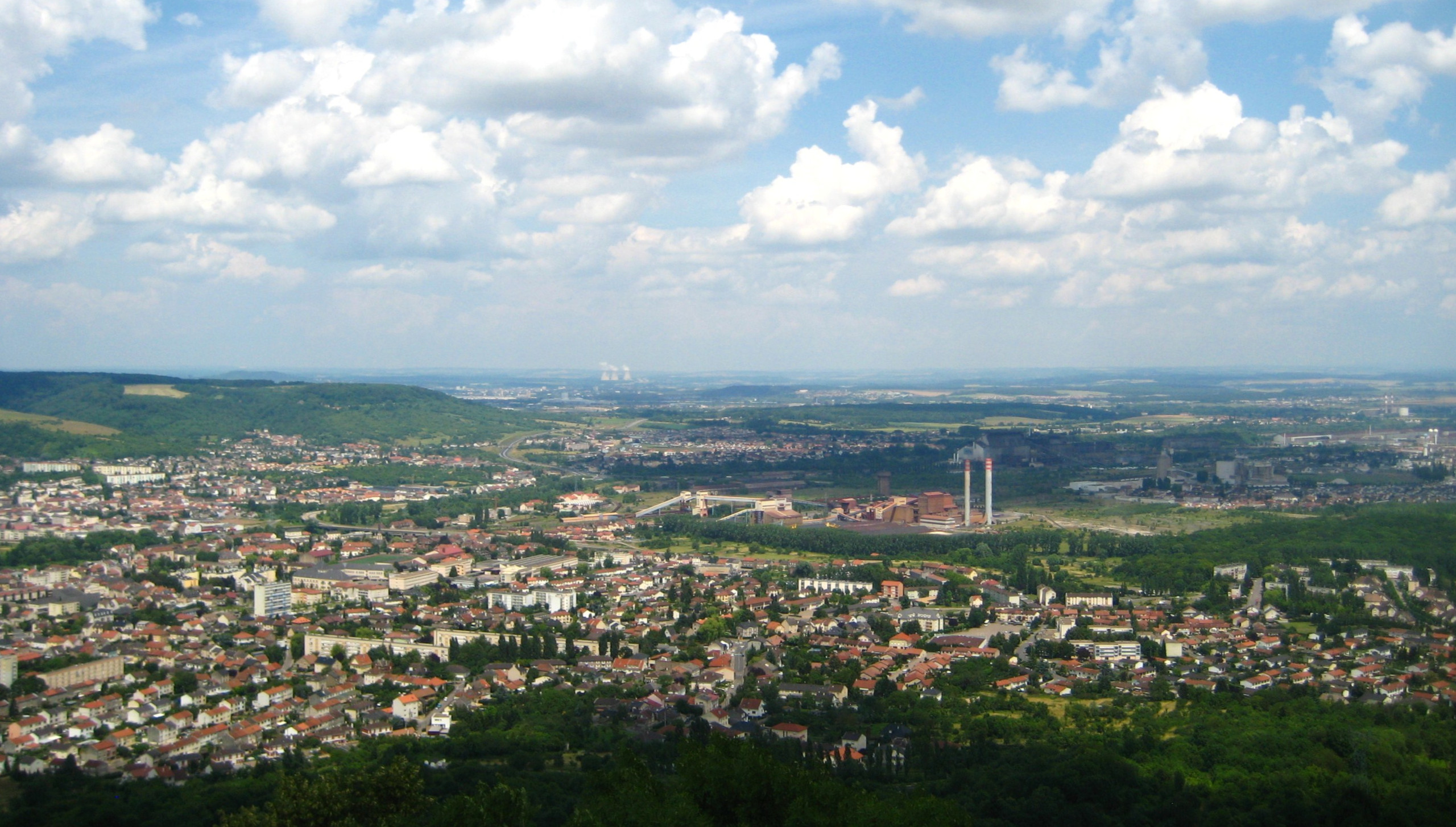 Description Vue panoramique de la Tour de DrinceDate 26 June 2009Source mon appareil photoAuthor Aimelaime Vue panoramique de la Tour de Drince